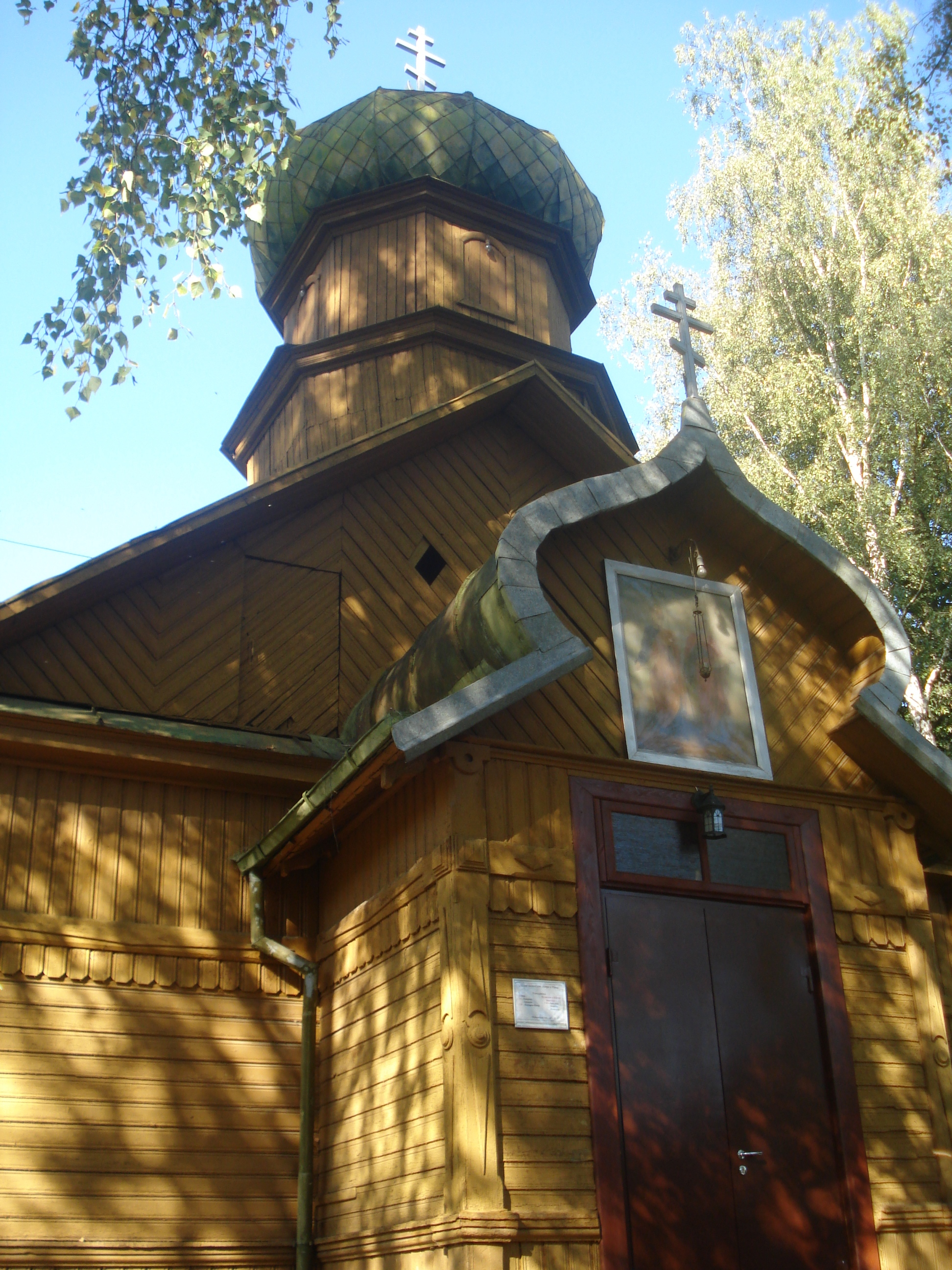 Russian Orthodox Church of St. Peter and St. Paul in Naujoji Vilnia (A. Kojelavičiaus g. 148)